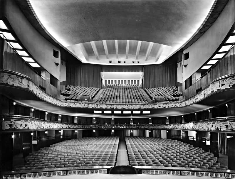 Milano, la sala del Teatro Lirico appena rifatta da Cassi Ramelli.